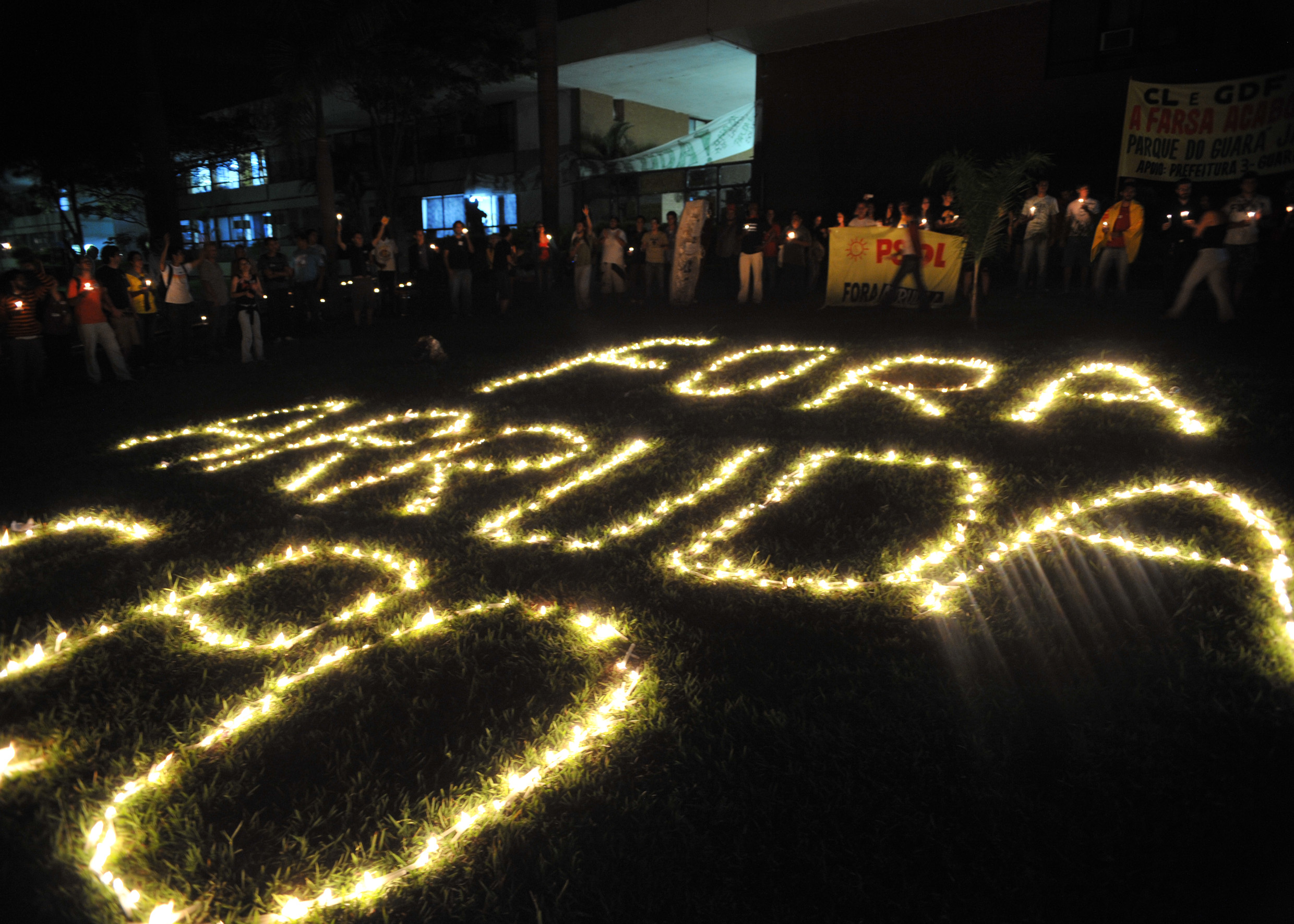 Manifestação contrária à permanência de José Roberto Arruda no cargo de governador do Distrito Federal do Brasil após escândalo de corrupção.